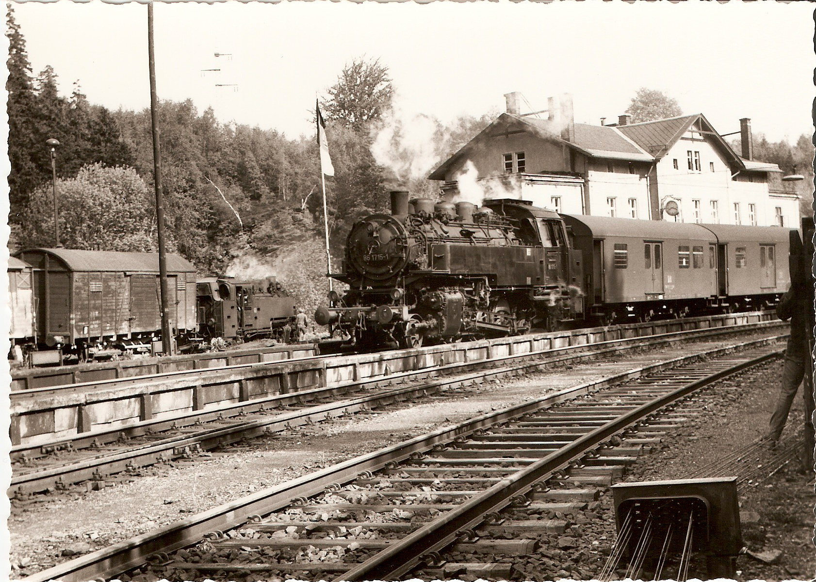 Normalspurige 86 1715 mit Personenzug und eine schmalspurige DR-Baureihe 99.77–79 mit Güterzug, letzte Fahrt Strecke Thum Wilischthal.